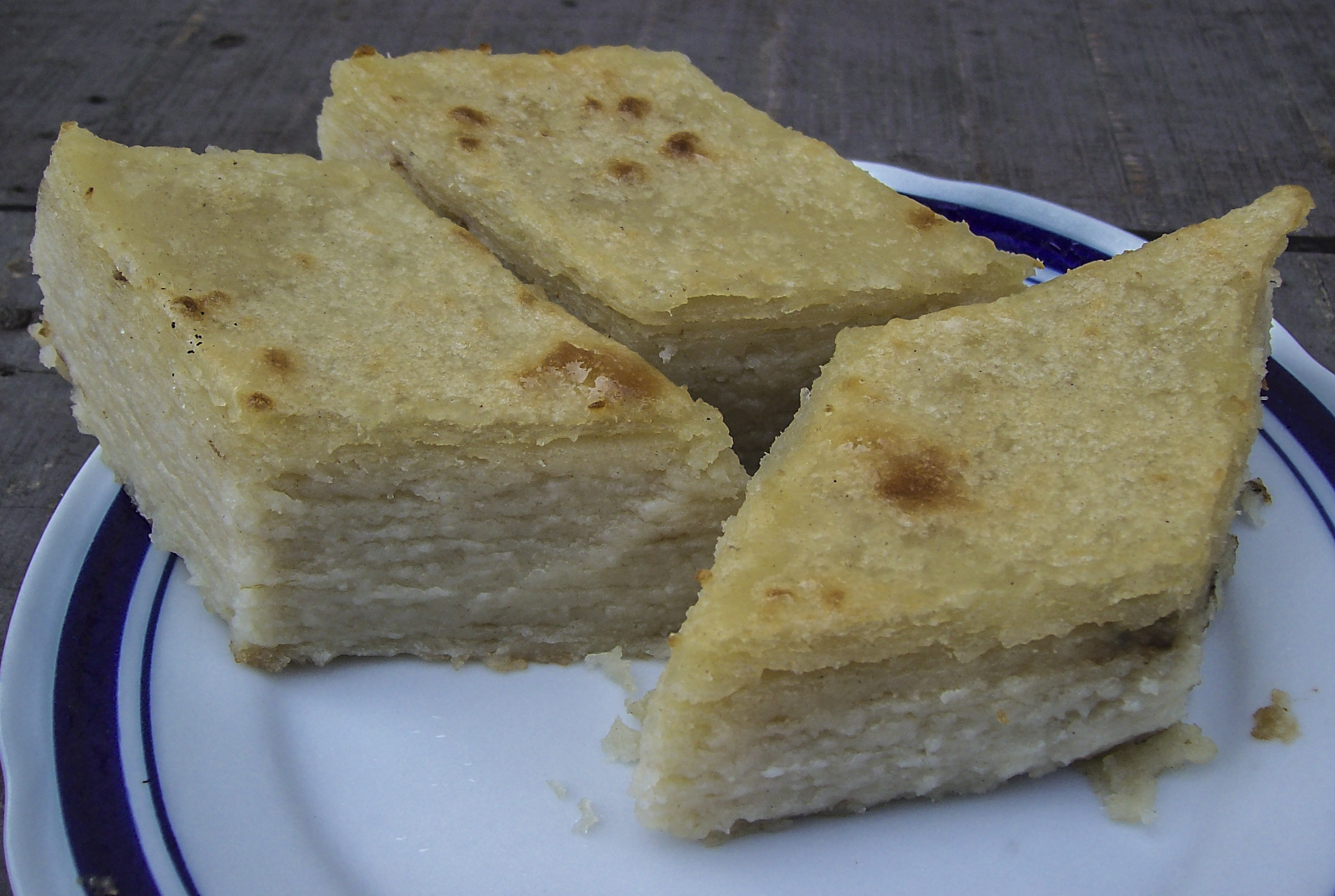 традиционално јадење во струшко и охридско, Ѓомлезец, се прави од тесто кое се пече под сач, во многу слоеви